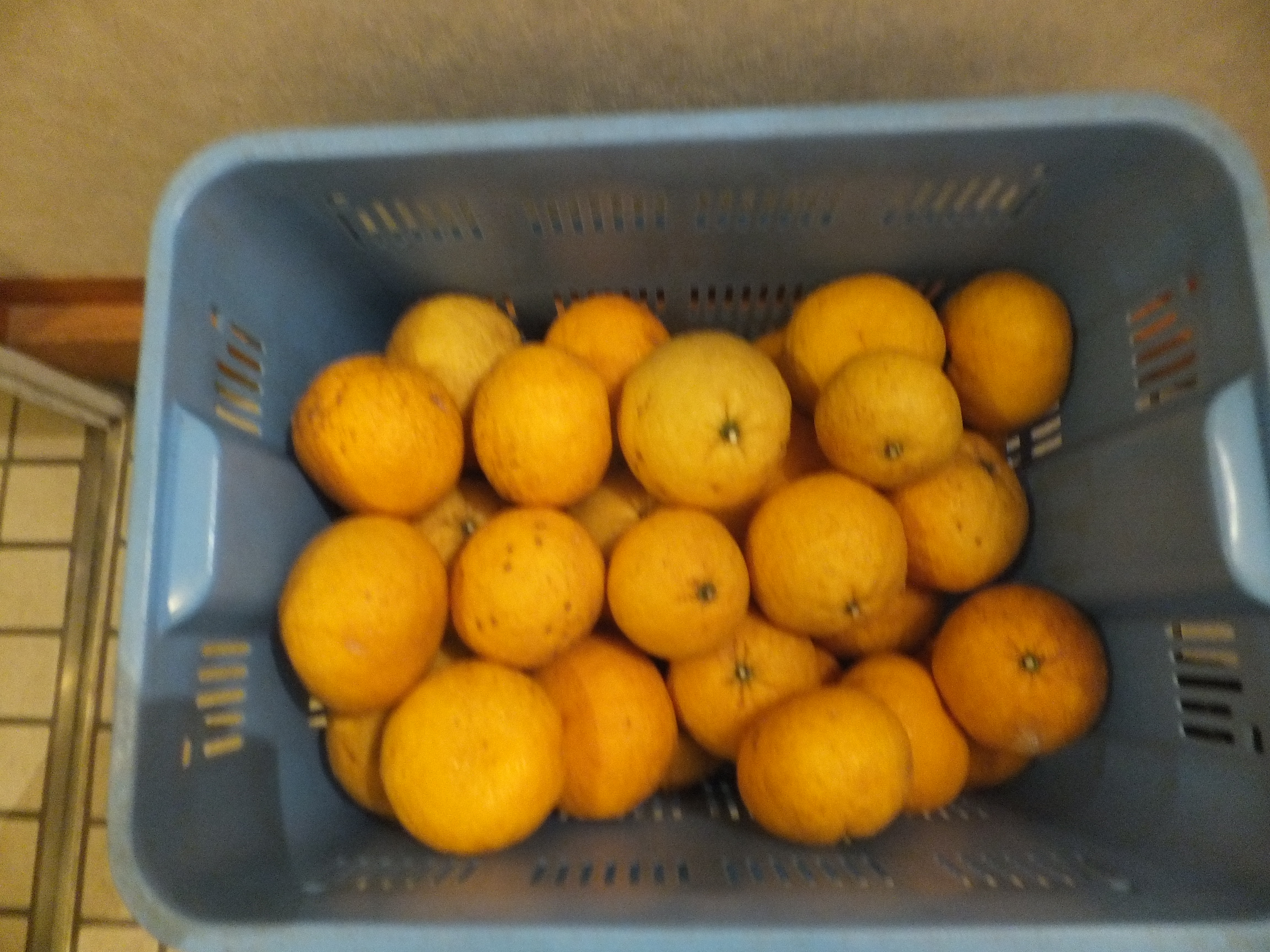 楠根夏みかん（徳島県阿南市楠根町）